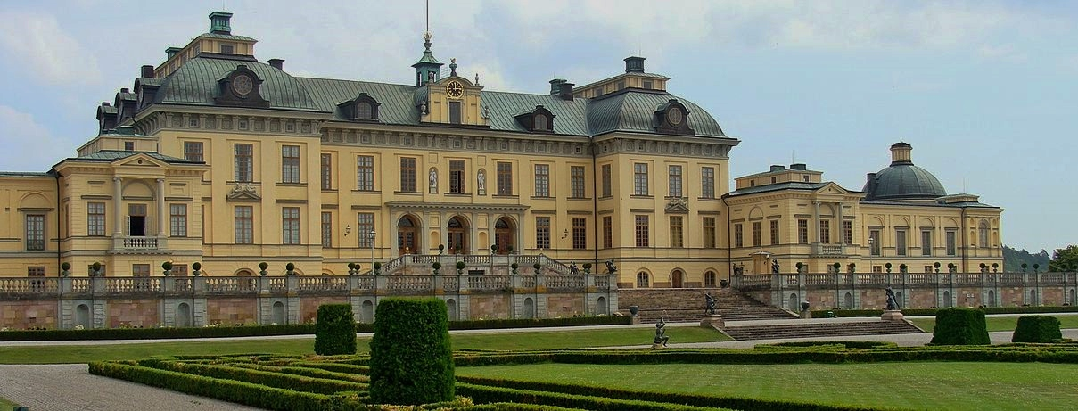 Drottningholms slott i Ekerö